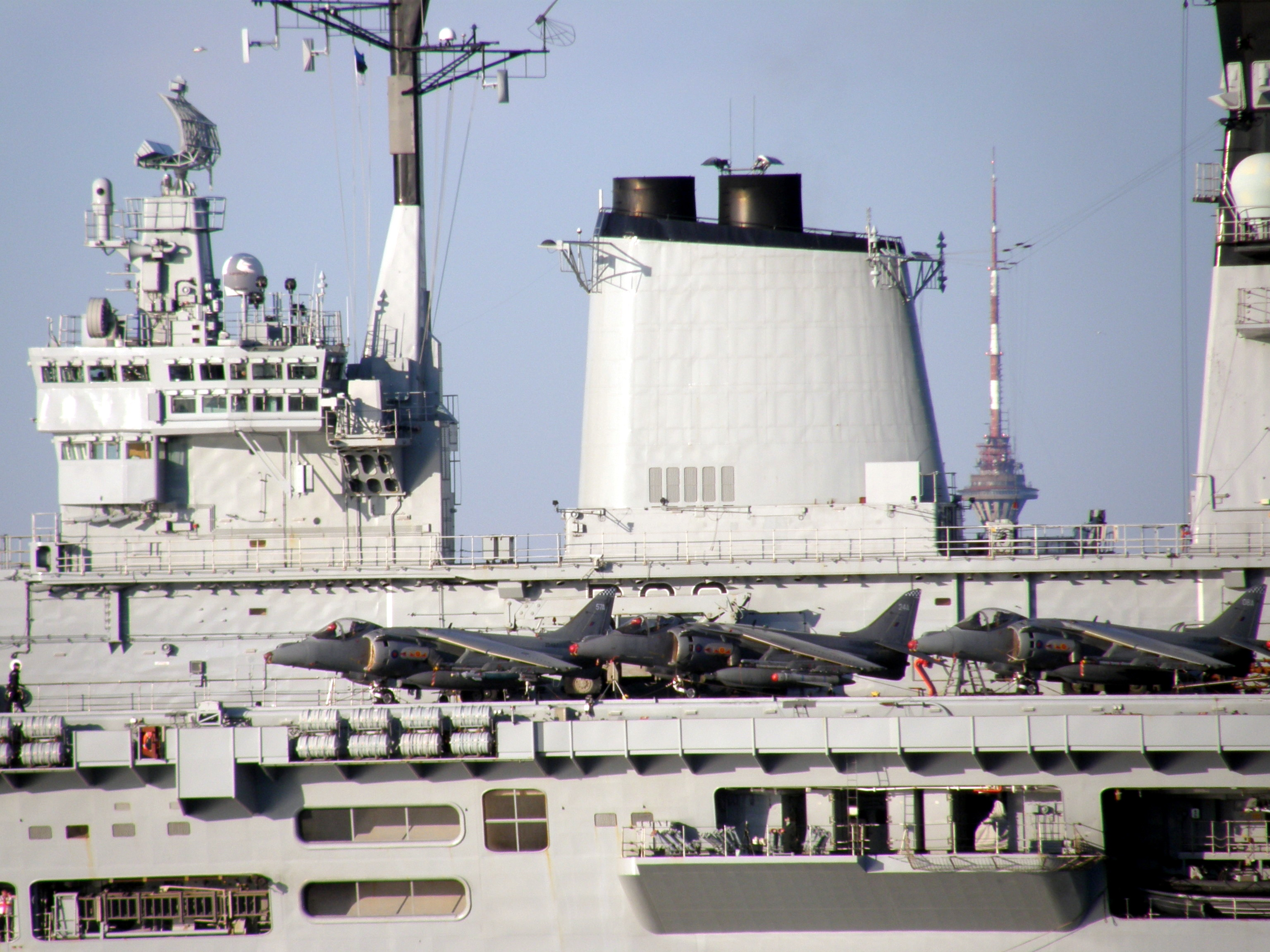 Illustrious Tallinnas Harrieridega pardal. Taustal Tallinna teletorn.